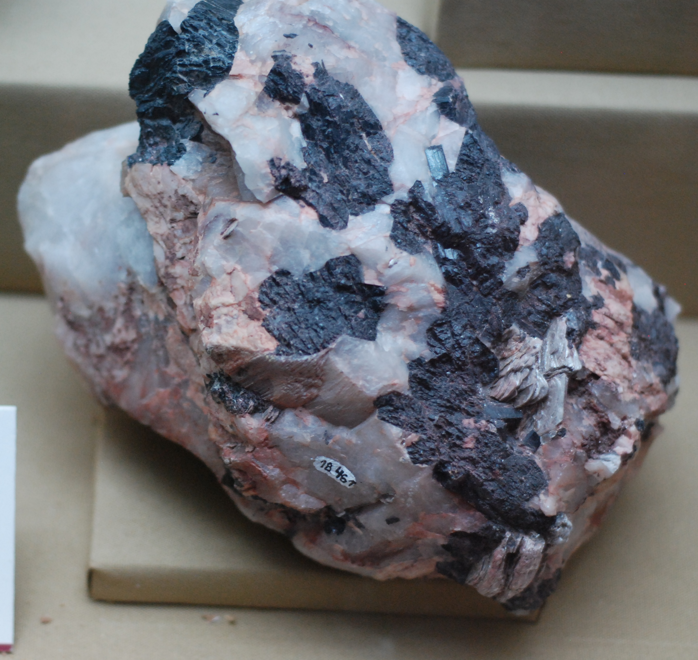 Pegmatita con cuarzo feldespato y turmalina. Roca ígnea plutónica. El gran tamaño de los cristales indica un enfriamiento lento a poca profundidad. San Luis, Argentina.